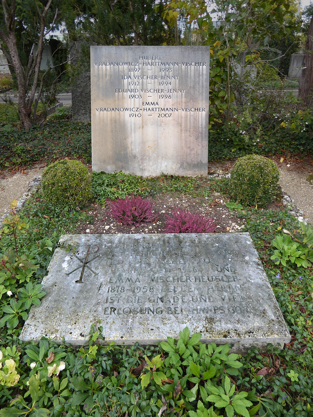 Eduard Vischer-Jenny (1903–1996) Dr.phil., Historiker, Gymnasiallehrer, Landesarchivar und -bibliothekar. Grab auf dem Friedhof Wolfgottesacker, Basel